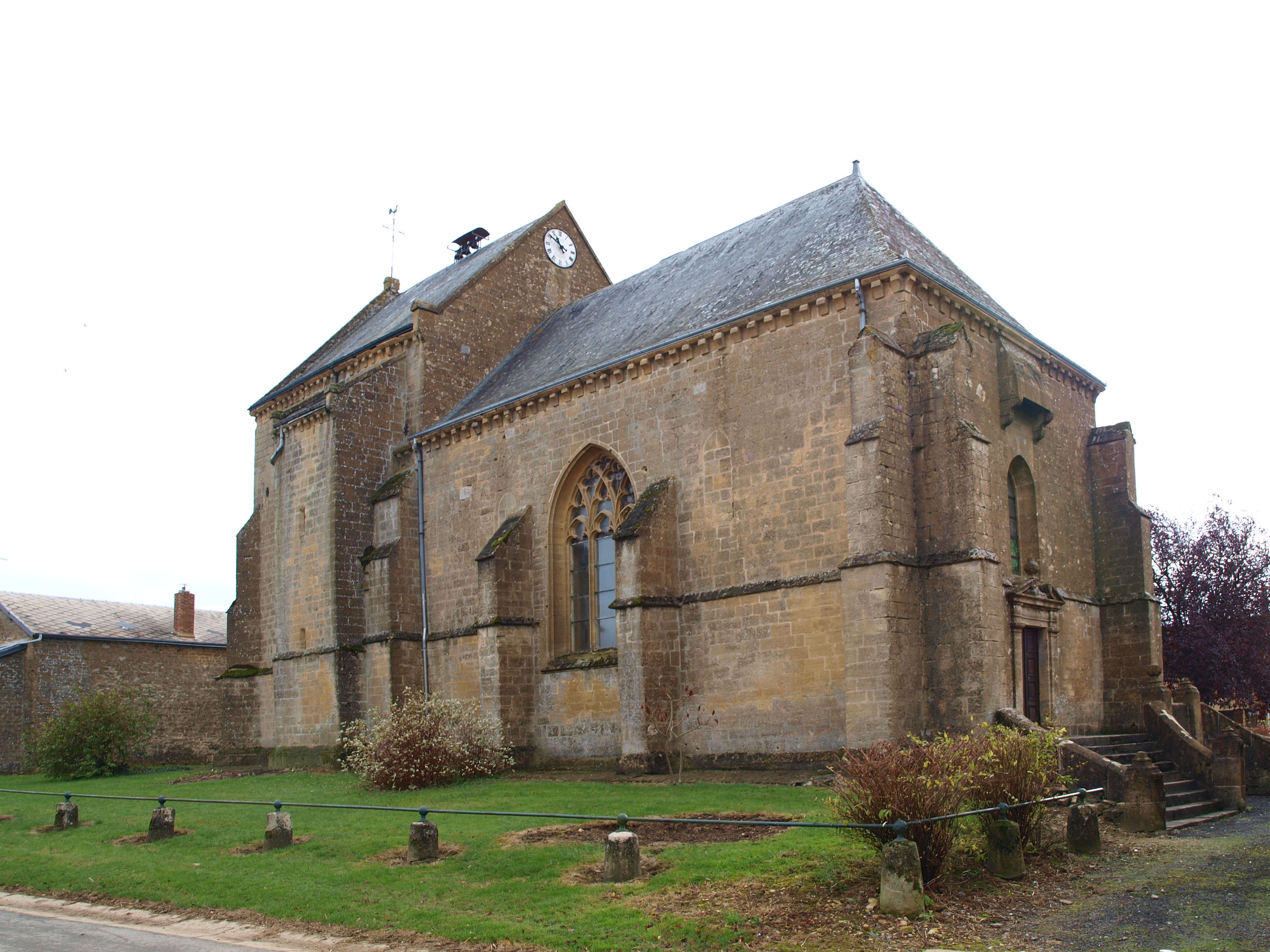 Authe (Ardennes, France) ; Église Saint-Martin